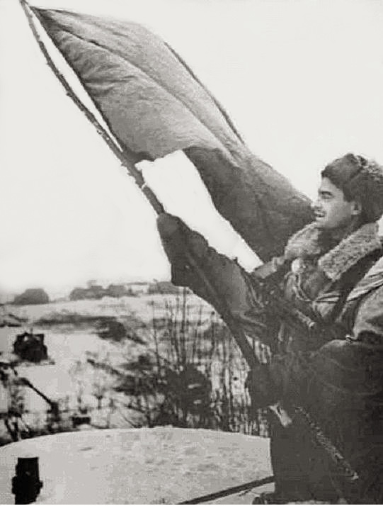 Красный флаг над Вороньей горой. 19 января 1944 года.